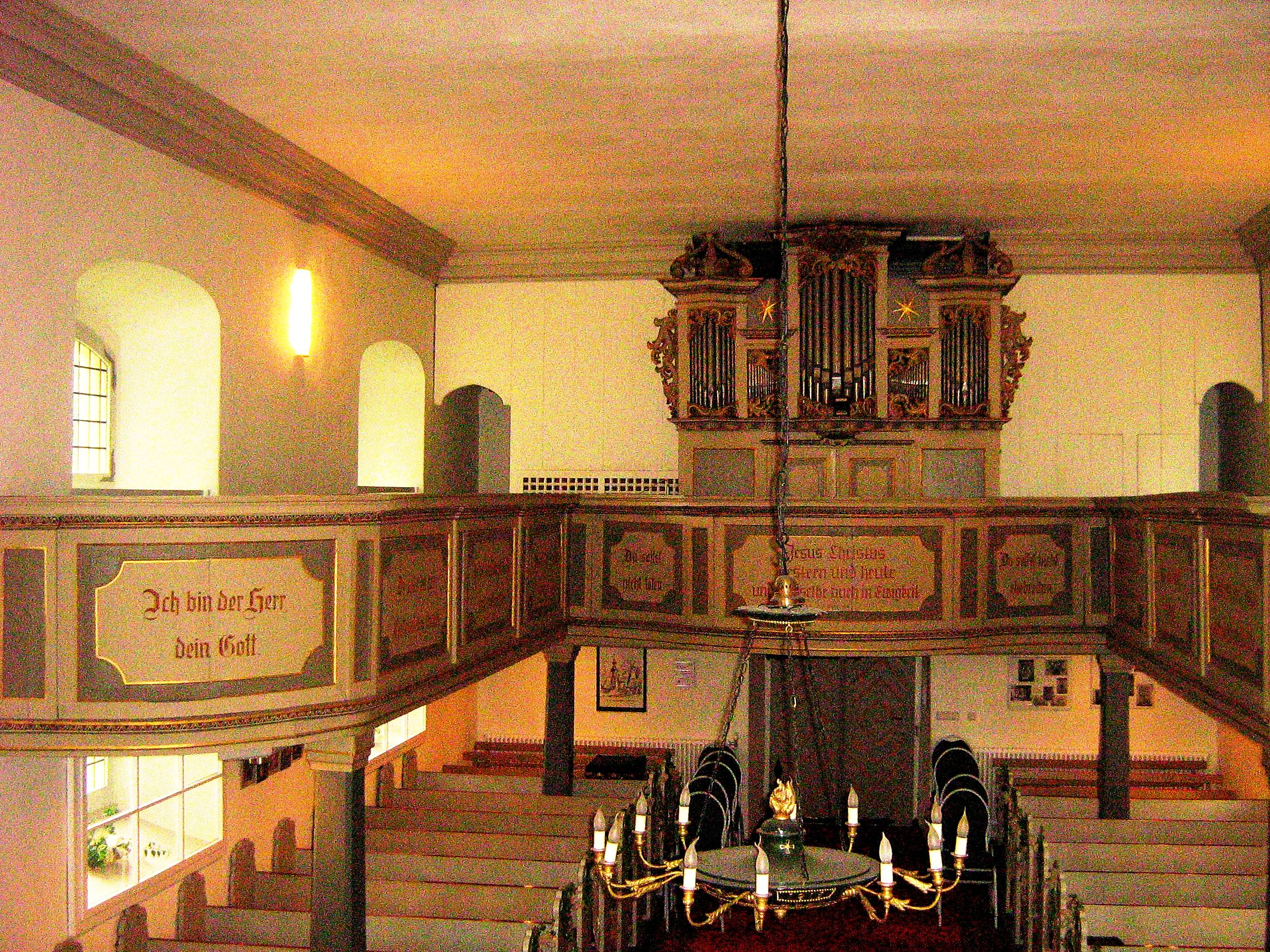 Dorfkirche Schönwalde-Glien, Hufeisen-Empore mit Wagner-Orgel